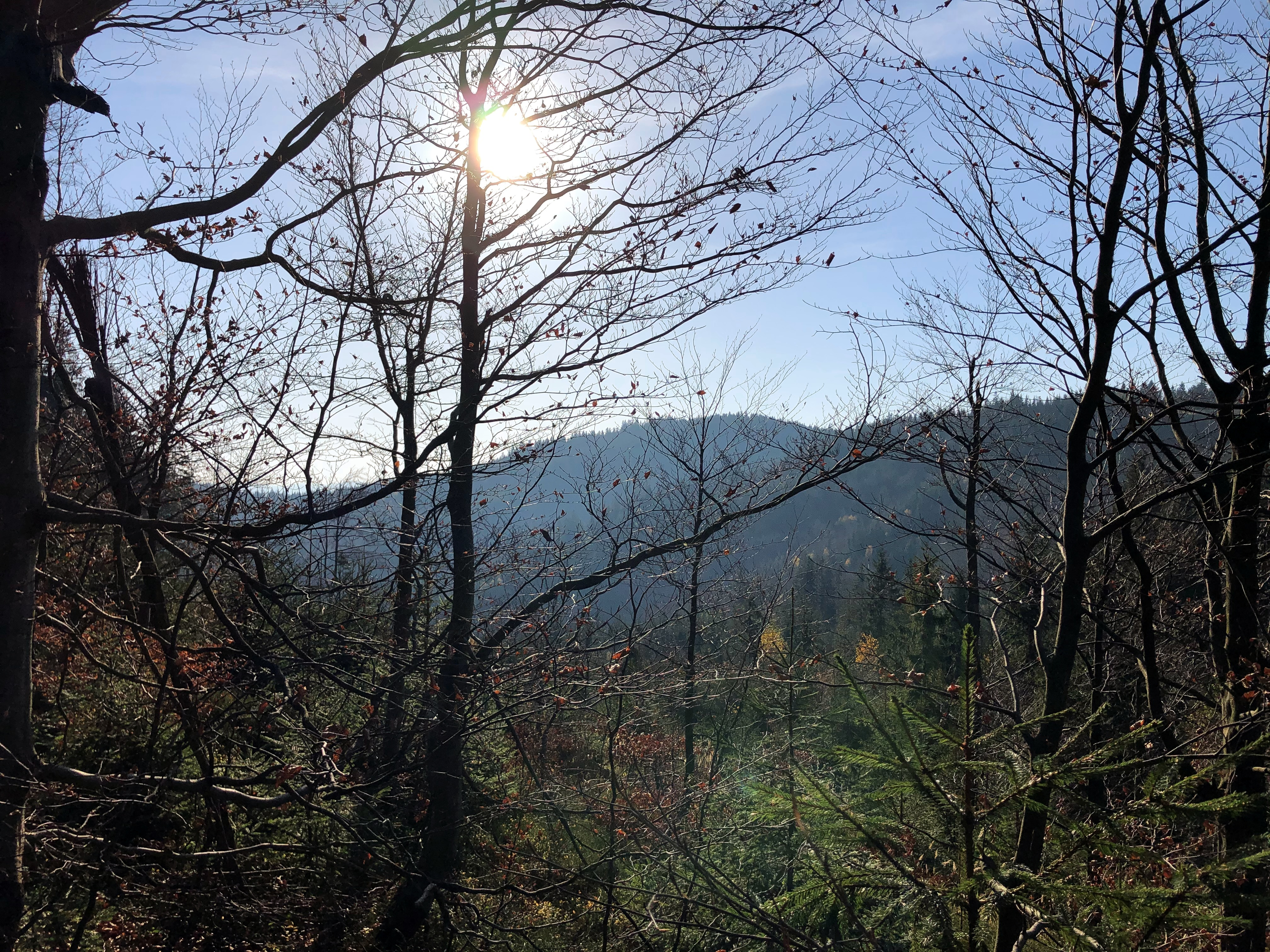 Uhorská (1029 m) od rozcestí Čuboňov na severovýchodě